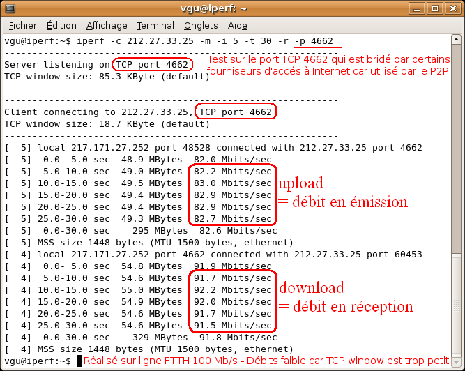 Iperf sur le port TCP 4662 sous linux avec une connexion FTTH